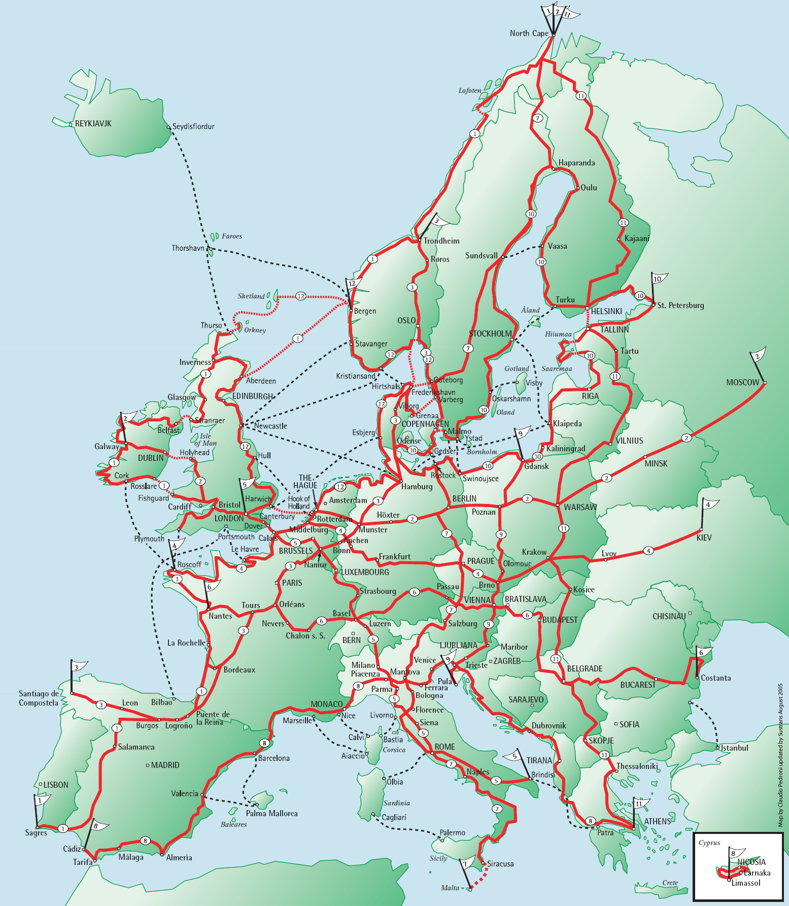 Verlauf der EuroVelo-Radwege in Europa